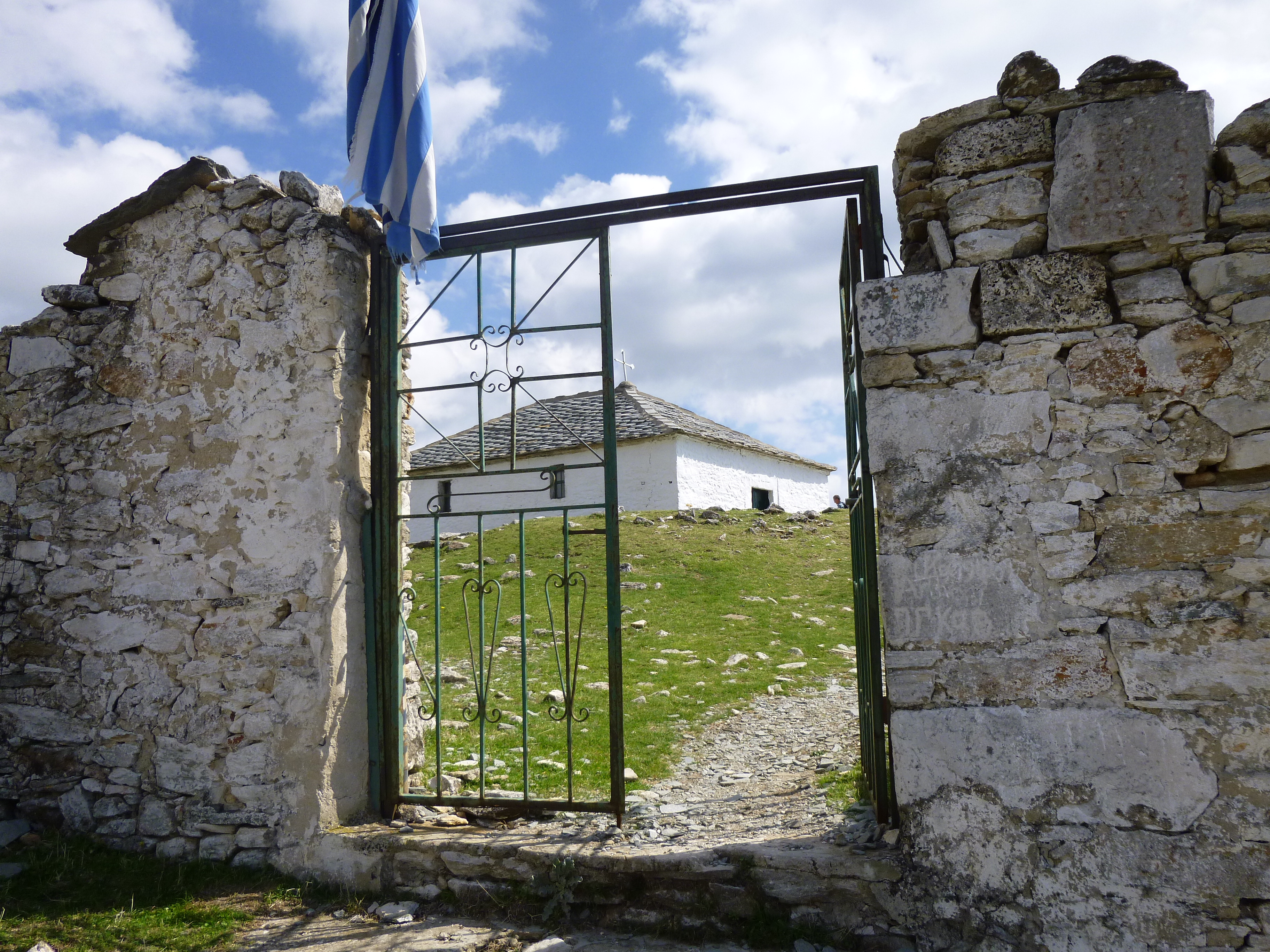 Beinhaus im Bergdorf Kastro auf der griechischen Insel Thassos.